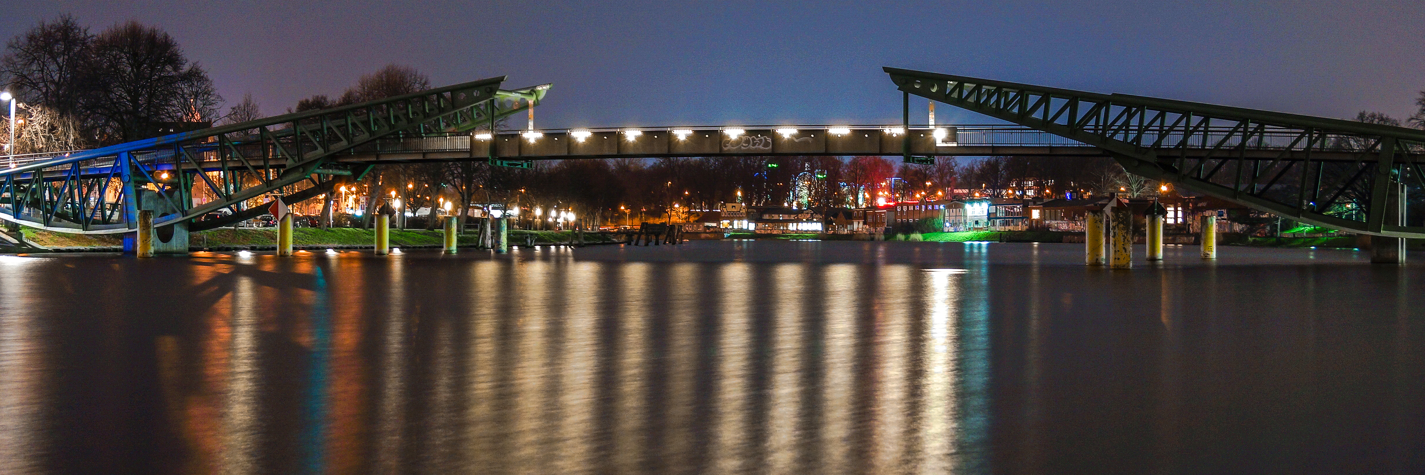 Die Klughafenbrücke (auch Glitzerbrücke genannt).